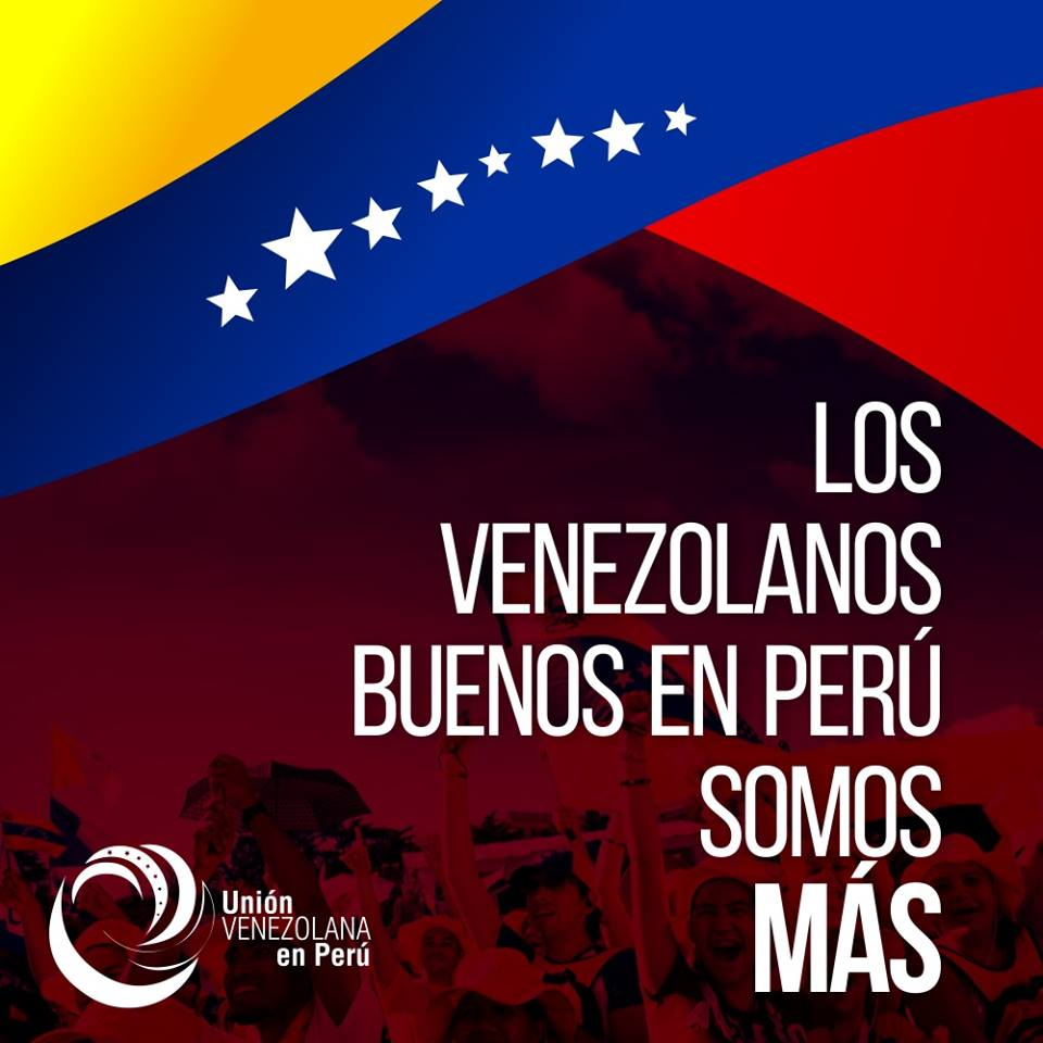 Publicidad a favor de los refugiados venezolanos en Perú ante los desmanes provocados por venezolanos en la ciudad de Lima.